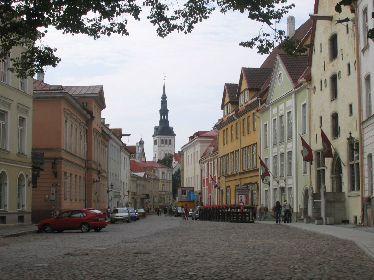 Lai tänav Tallinnas.